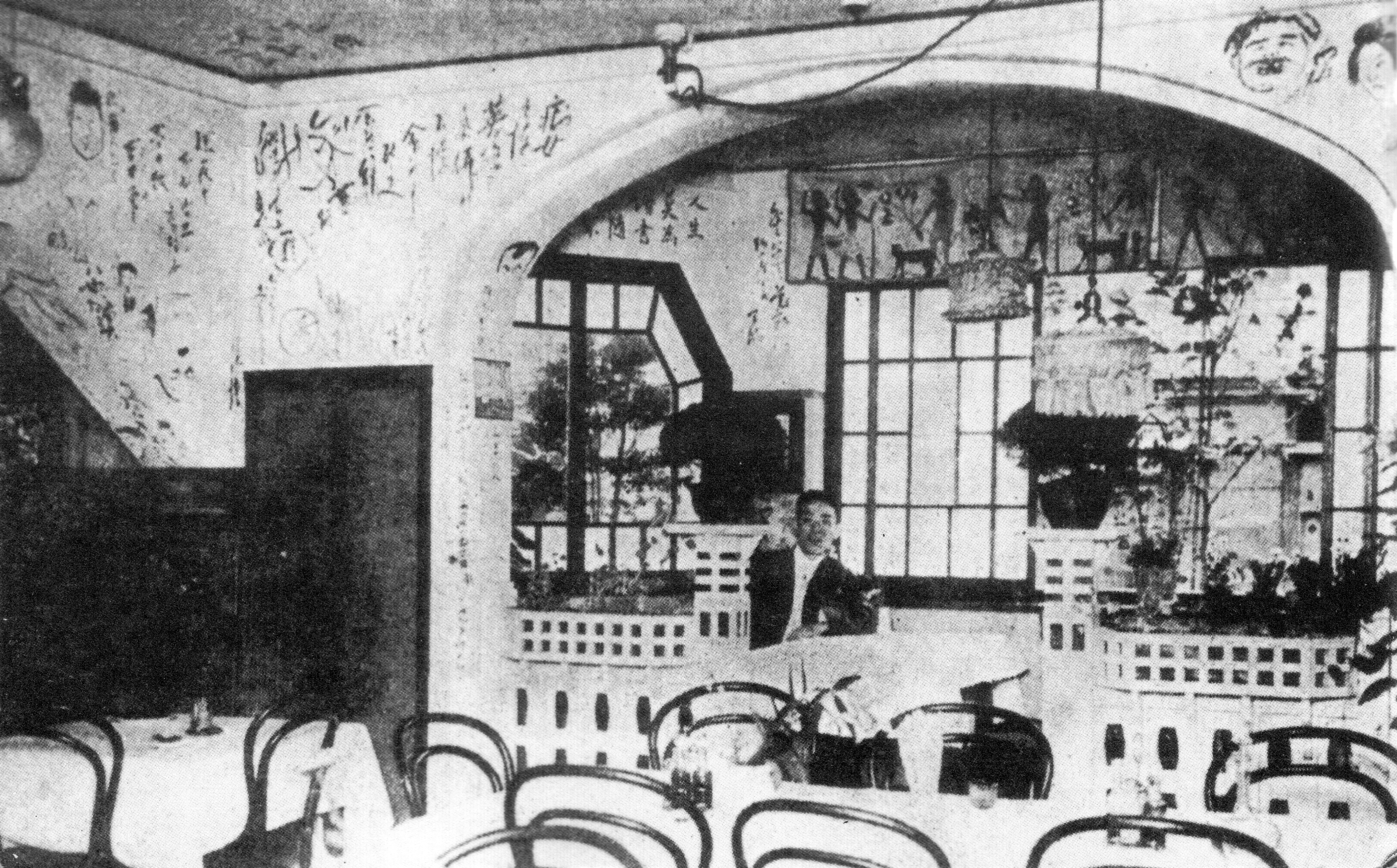 日本初のカフェといわれるカフェー・プランタンの店内。